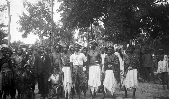 Negatief. Inwoners van Sawu dragen feestkleding in verband met de uitreiking van de 'Bronzen Ster' aan de raja van Sawu in 1924